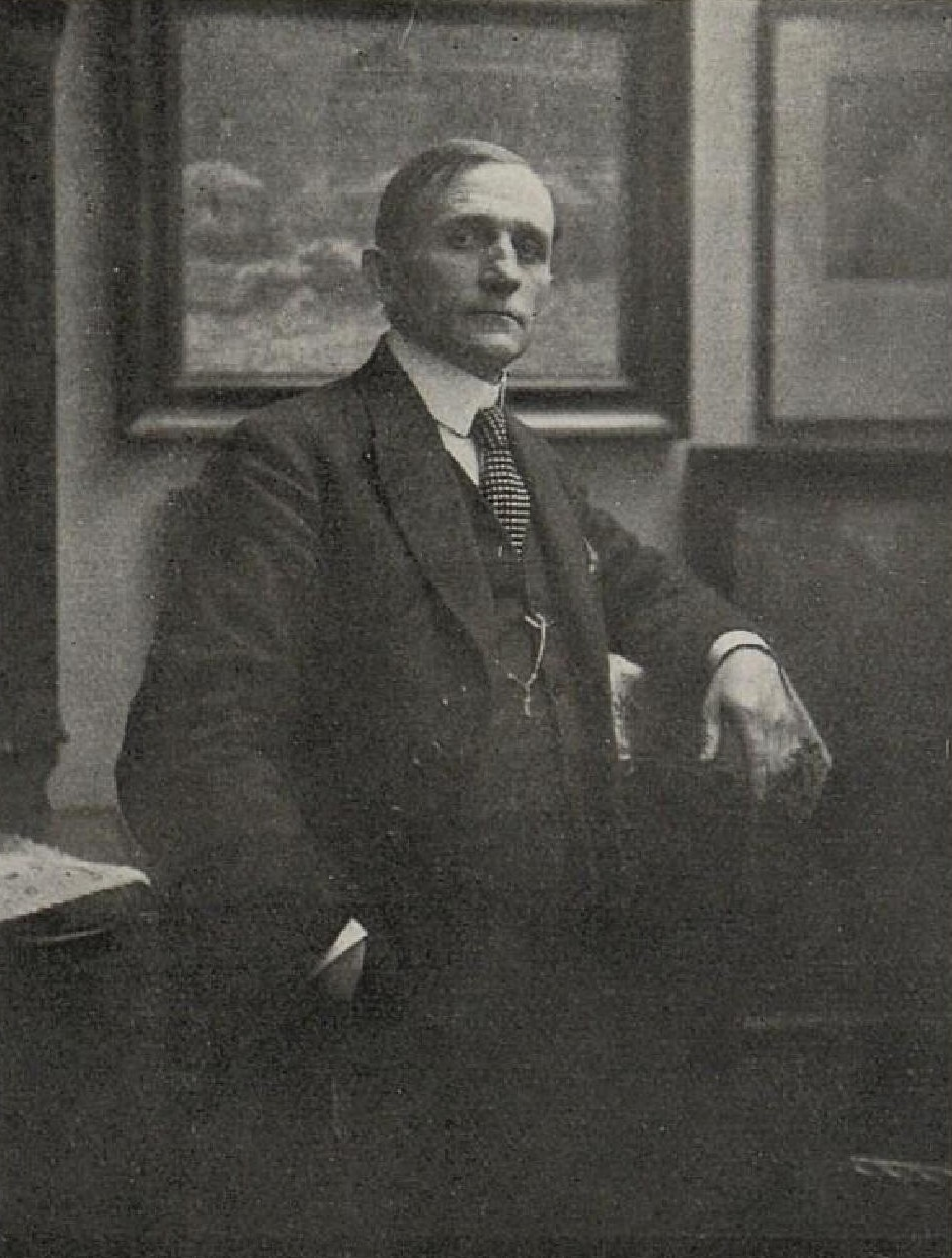 Zdeněk Nemastil, český malíř, krajinář.